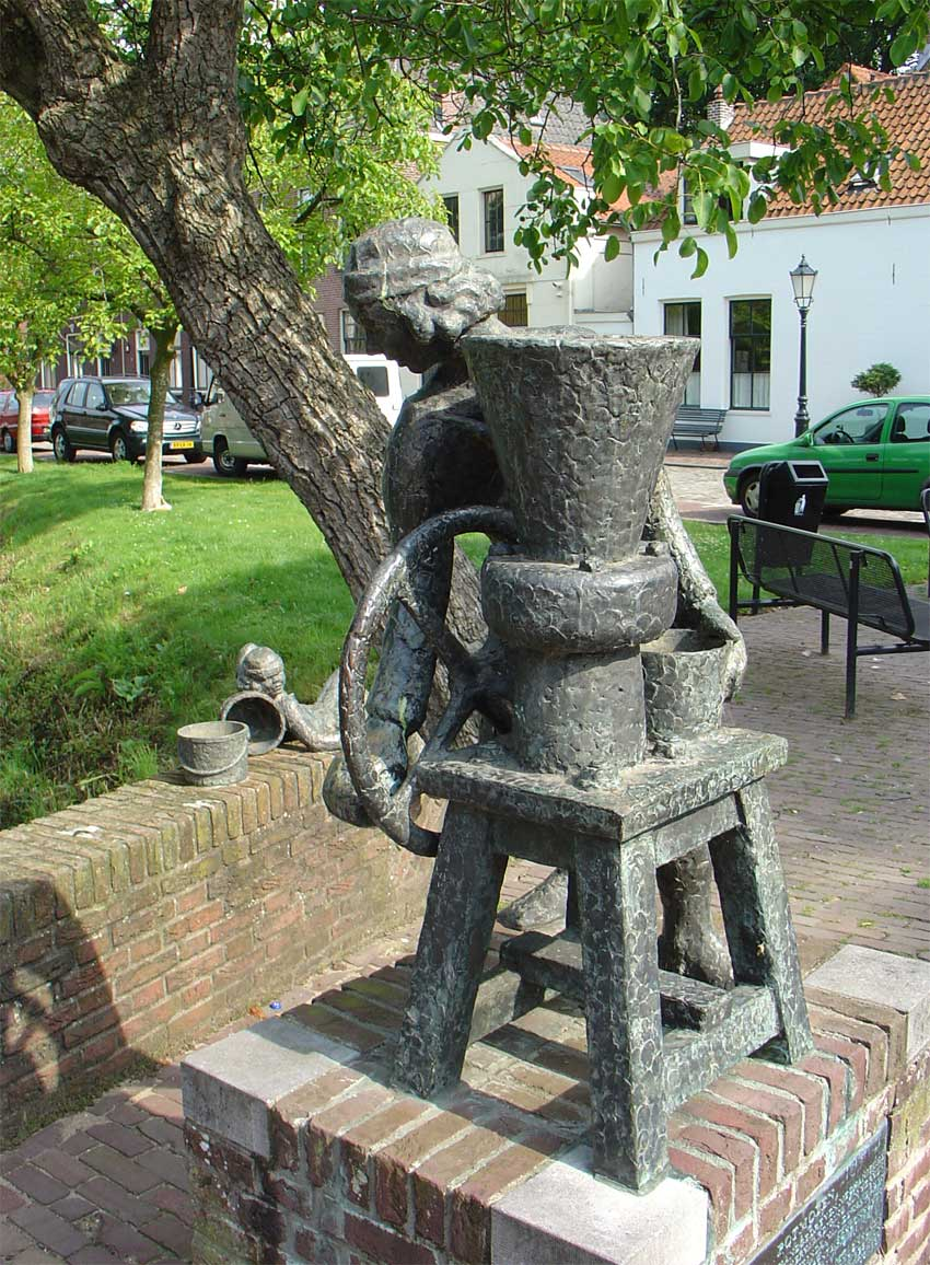 Potmolenaar door Jan van Ipenburg - Scheepmakershaven/ Veerstraat Schoonhoven